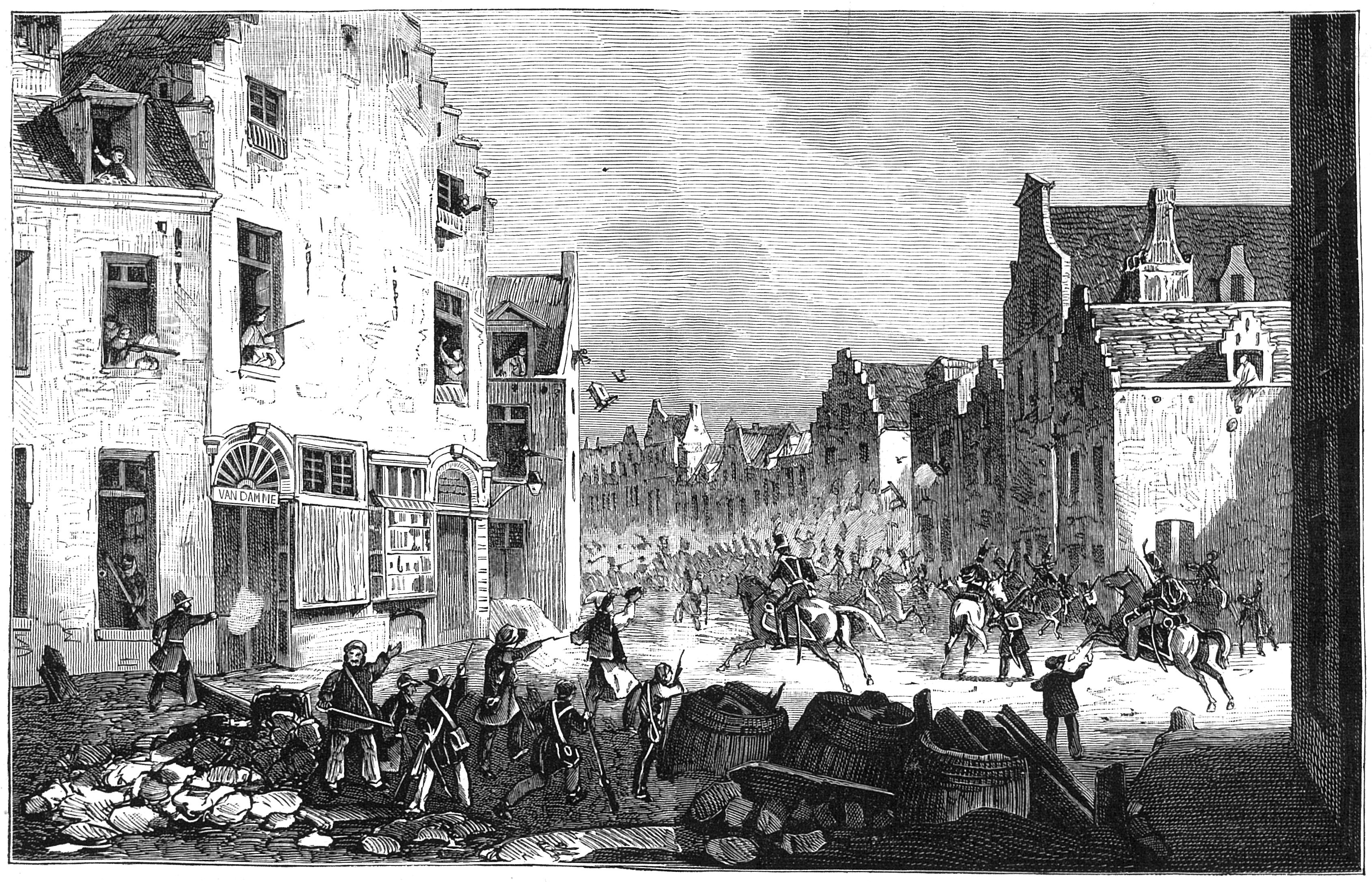 Révolution belge de 1830 — La rue de Flandre le jeudi 23 septembre 1830.